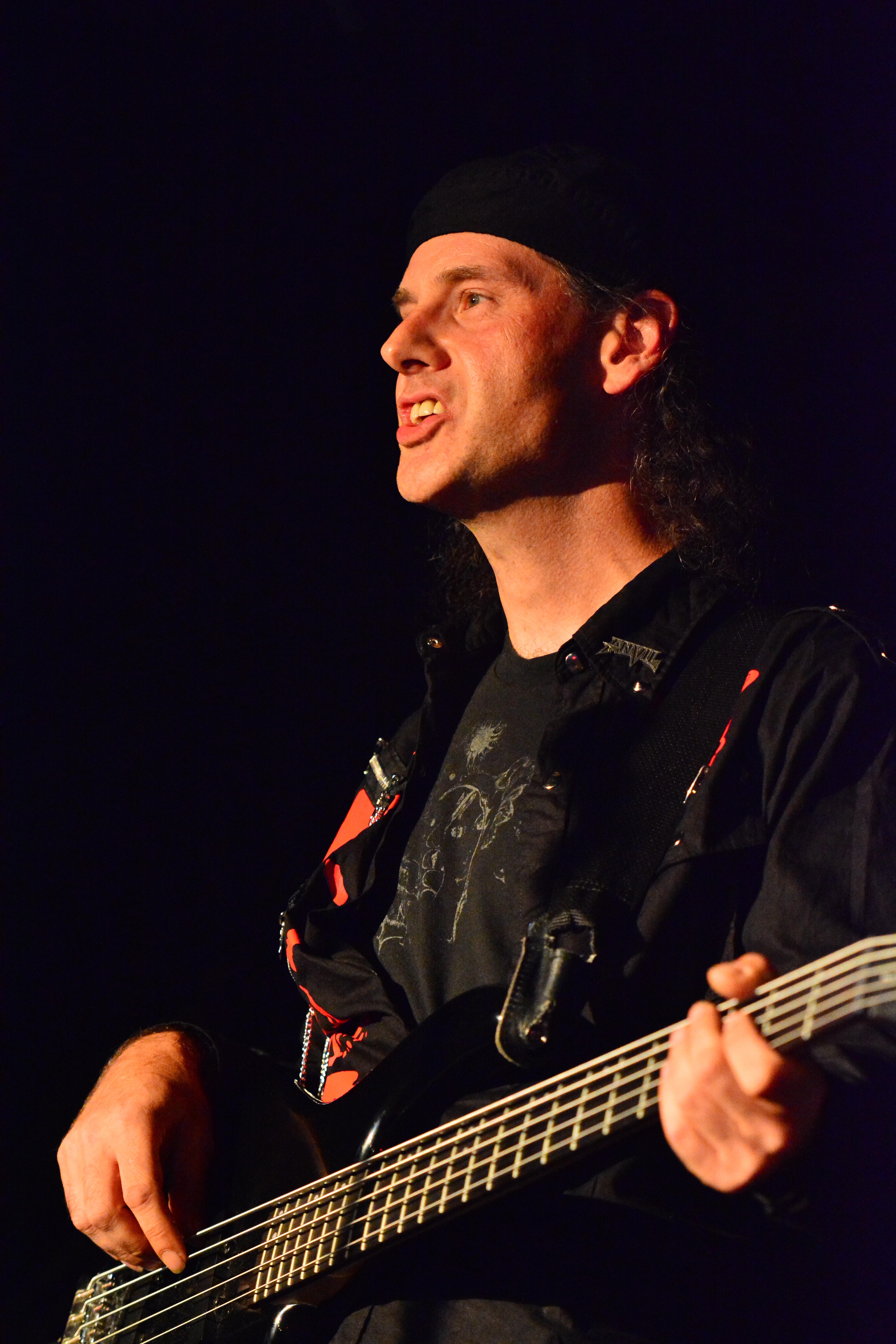 Chris Robertson von Anvil beim Headbangers Open Air 2014